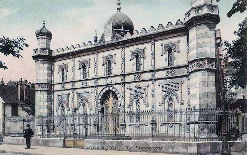 La synagogue de Besançon, date inconnue.